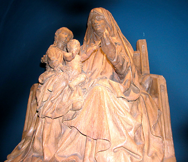 Das Gnadenbild «Anna Selbdritt» bei Haltern-am-See